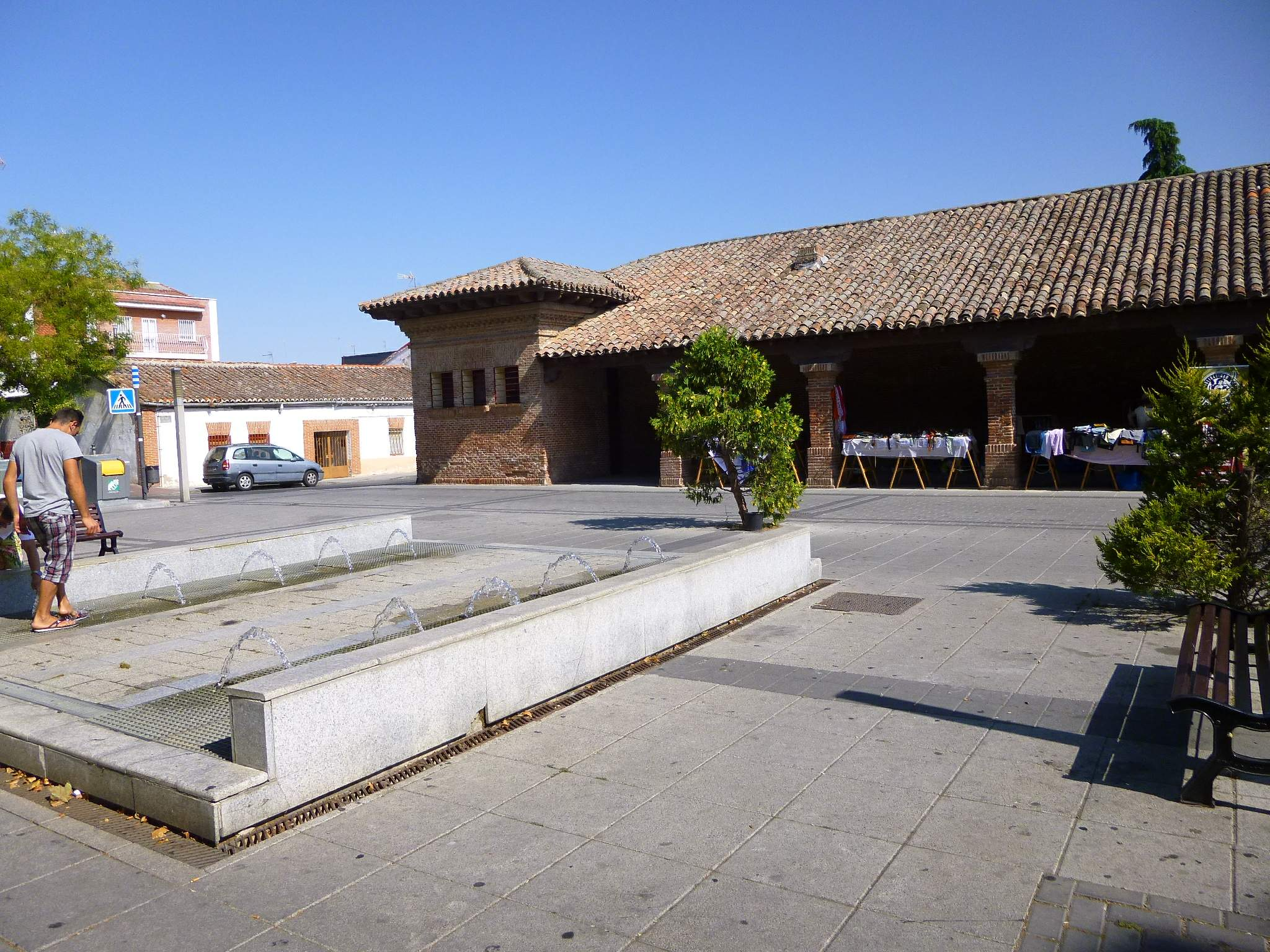 Parla, Plaza de la guardia civil, enfrente el edificio historio de las antiguas escuelas del municipio